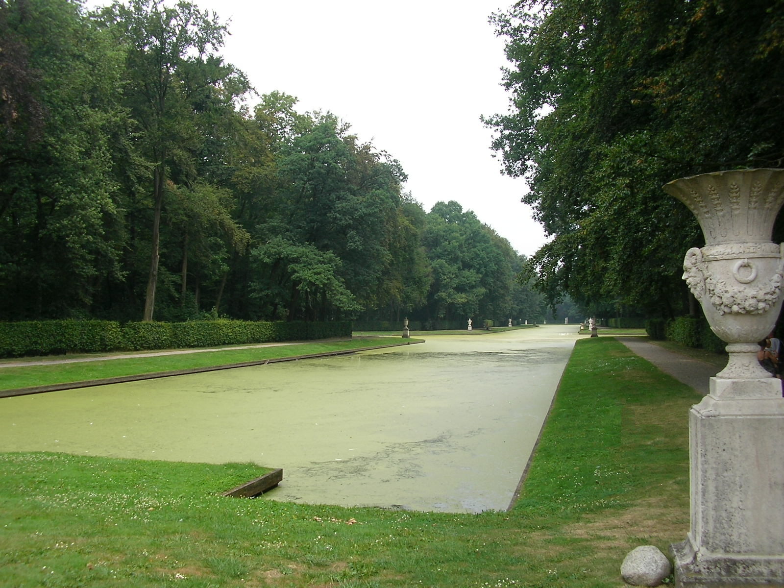 Kasteel De Haar 22 juli 2006 Gemaakt door wikipedia vrijwilliger gijsevers